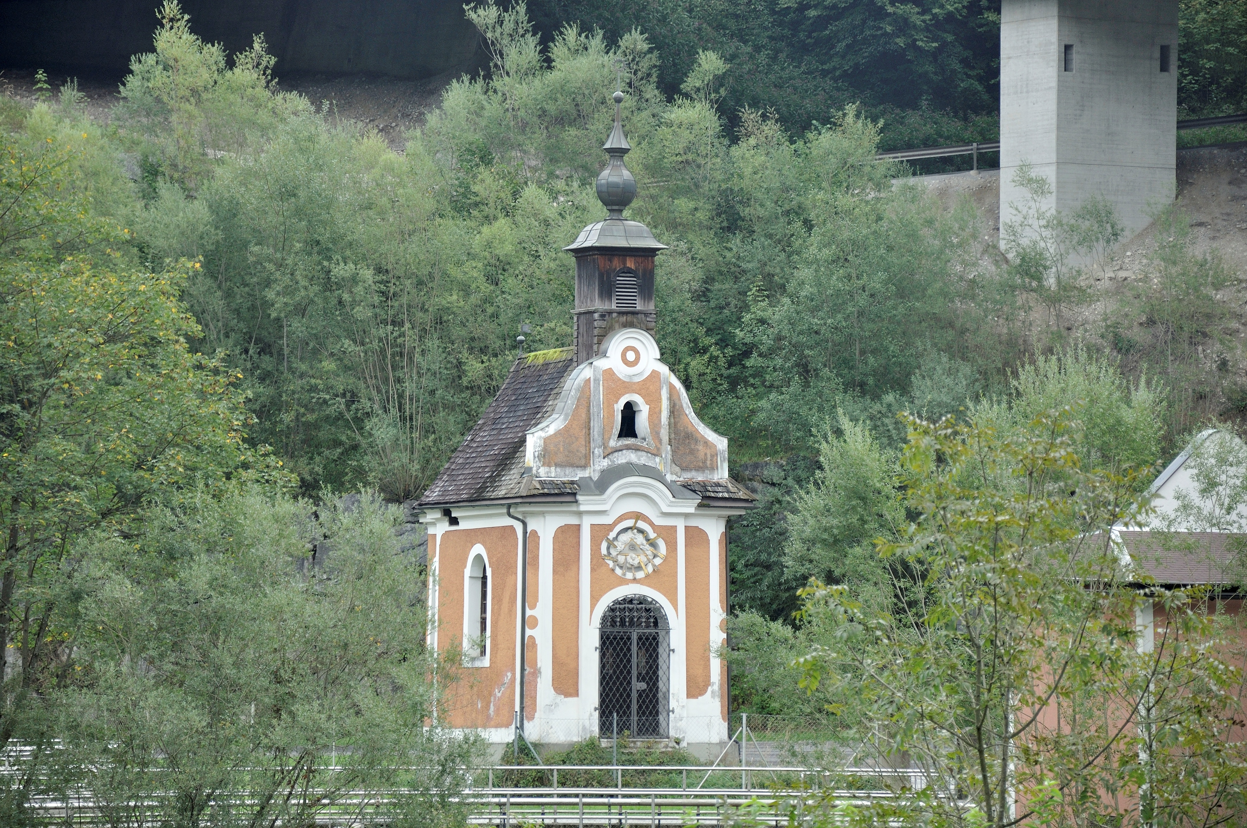 Flößerkapelle, Gruber-Kapelle